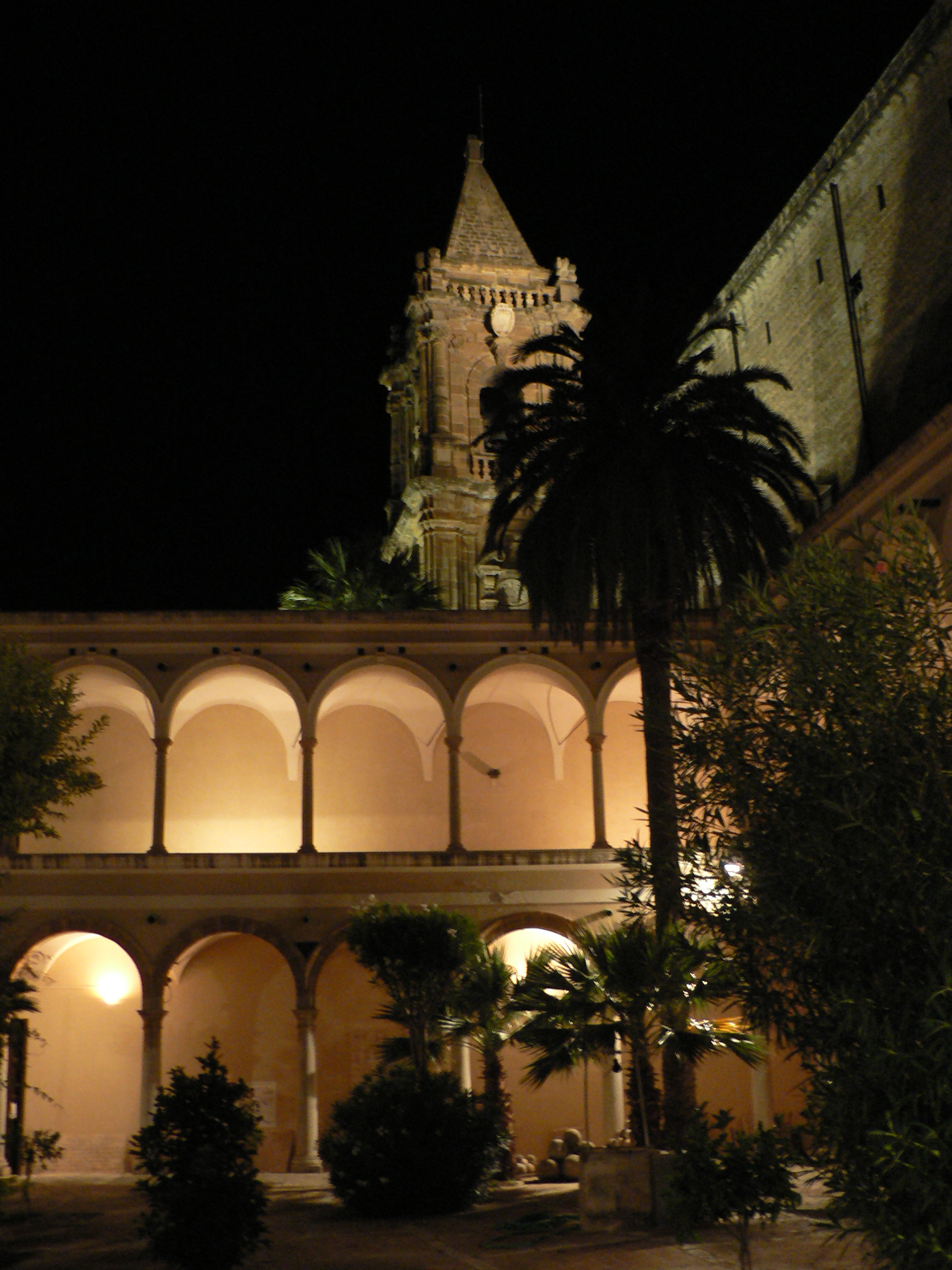 Trapani, immagine notturna del chiostro dell'ex Convento dell'Annunziata, ora sede del Museo regionale Agostino Pepoli.